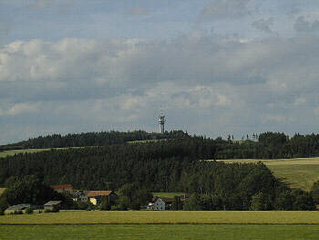 Pechtnersreuth